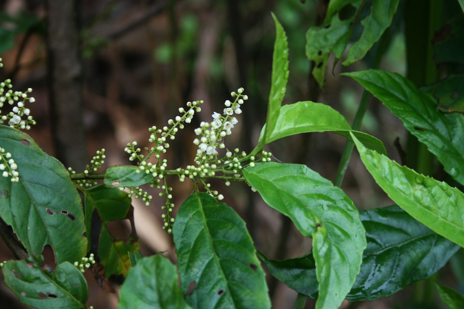 Maesa montana, Primelgewächse (Primulaceae), Maesoideae - Vietnam/Việt Nam: Phìn Hồ N Sìn Hồ (Prov. Lai Châu)